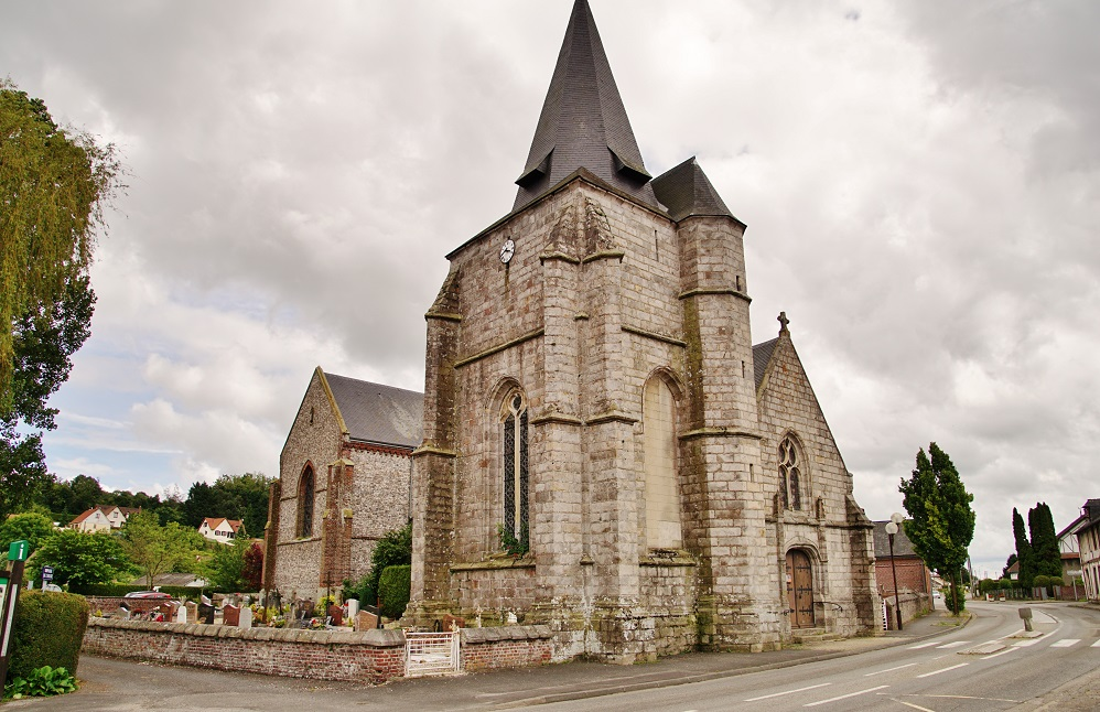 église St Valéry